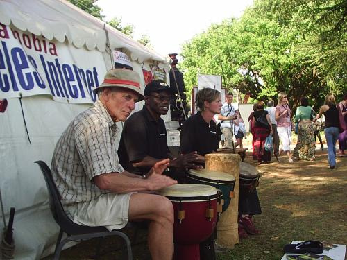 aardklop10_ngomavuma